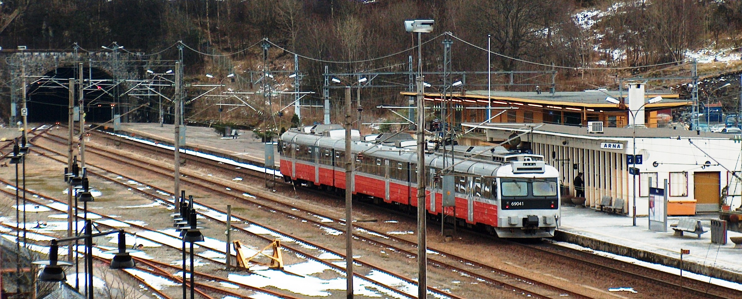 Arna stasjon